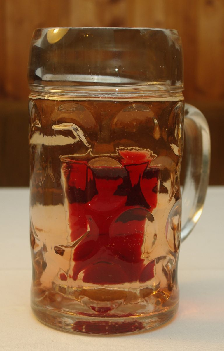 Fertige Laterndlmaß. Das Glas mit dem Kirschlikör wurde in der Weinschorle im Maßkrug versenkt und leuchtet jetzt rot, wie eine Laterne.